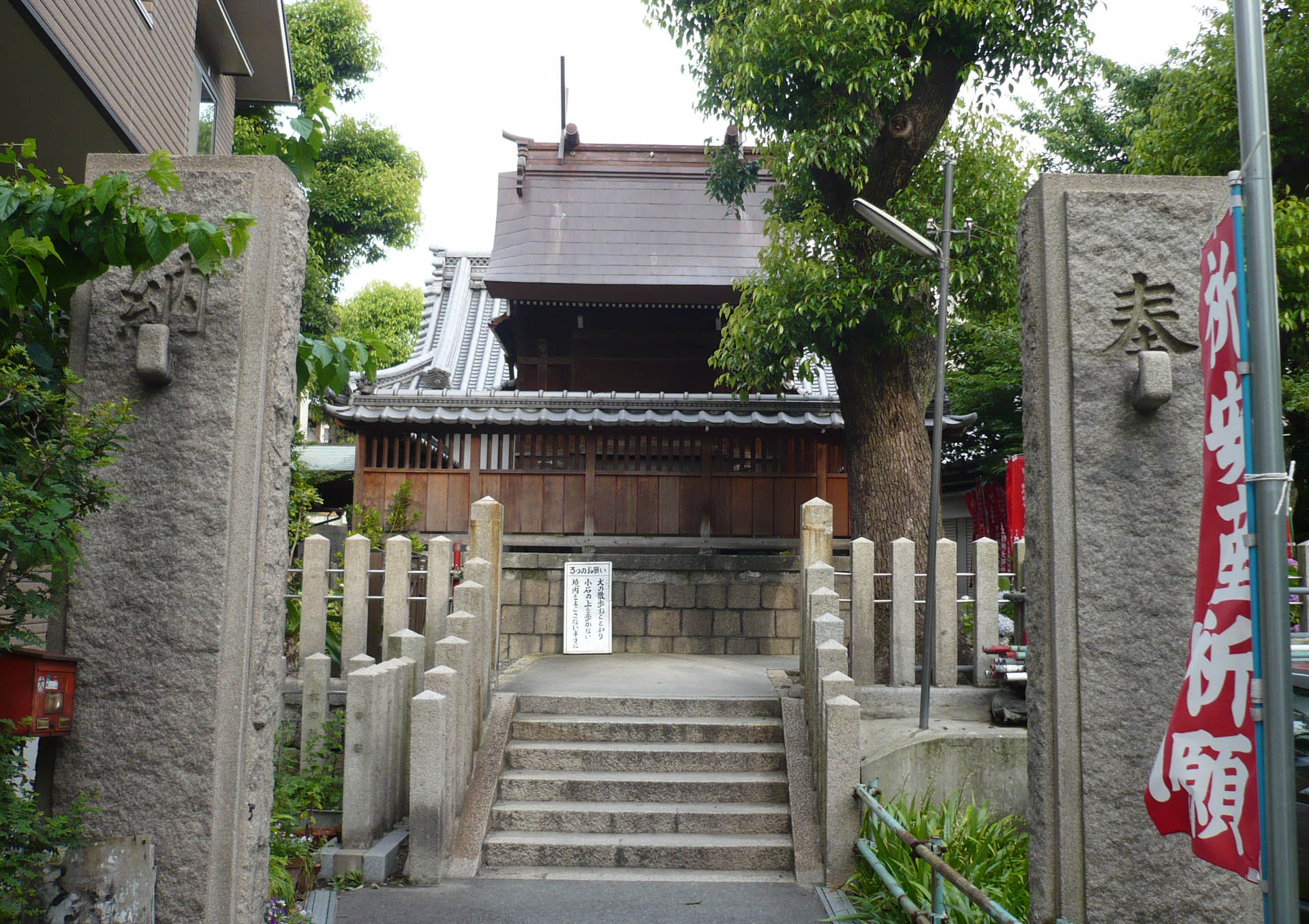 野江水神社を裏側より撮影